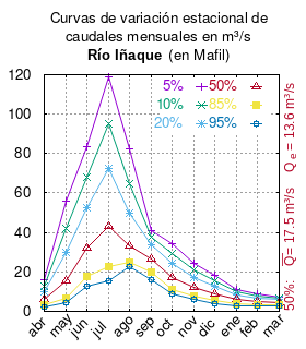 Curvas de variación estacional del río Iñaque en Mafil. # Dirección General de Aguas # Diagnóstico y clasificación de los cursos y cuerpos de agua según objetivos de calidad. Cuenca del río Valdivia. # Santiago de Chile # Ministerio de Obras Públicas (Chile) # 2004 # url: # urlarchivo: # Tabla 4.2: Río Iñaque en Mafil (m3/s), pág. 44 mes 5% 10% 20% 50% 85% 95% abr 16.17 12.92 9.86 5.87 3.10 2.13 may 55.61 41.84 29.65 15.34 6.81 4.23 jun 83.56 67.76 52.56 32.35 17.80 12.53 jul 119.12 95.12 72.43 43.02 22.65 15.54 ago 82.42 64.57 49.58 33.35 24.78 22.47 sep 41.19 37.58 33.53 26.69 19.64 16.10 oct 34.31 29.47 24.52 17.25 11.19 8.67 nov 24.52 20.92 17.26 11.95 7.60 5.82 dic 18.29 15.53 12.73 8.69 5.40 4.07 ene 11.23 9.92 8.46 6.07 3.80 2.79 feb 8.61 7.60 6.54 4.91 3.45 2.80 mar 7.16 6.54 5.82 4.59 3.32 2.71 This plot was created with Gnuplot.